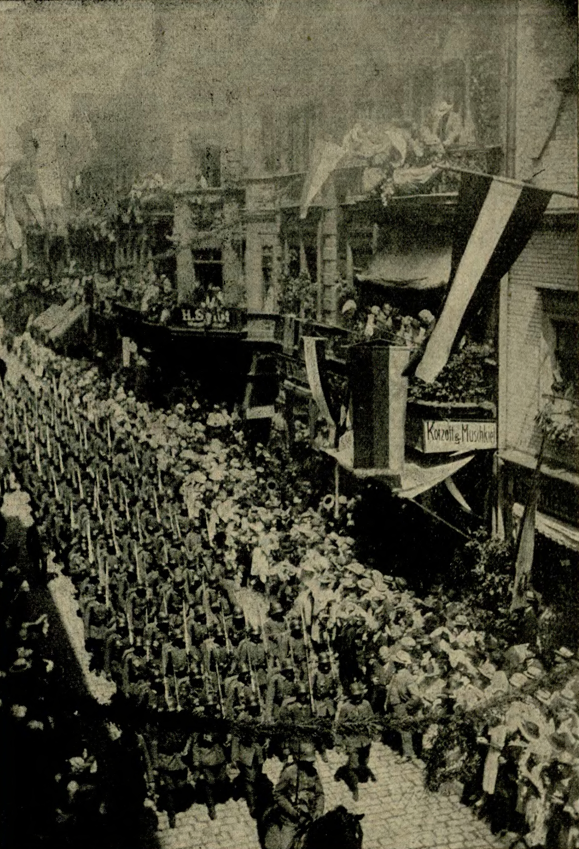 Feierlicher Einzug der Reichswehr in der Stadt Oppeln 1921 nach der Abstimmungszeit in Oberschlesien.